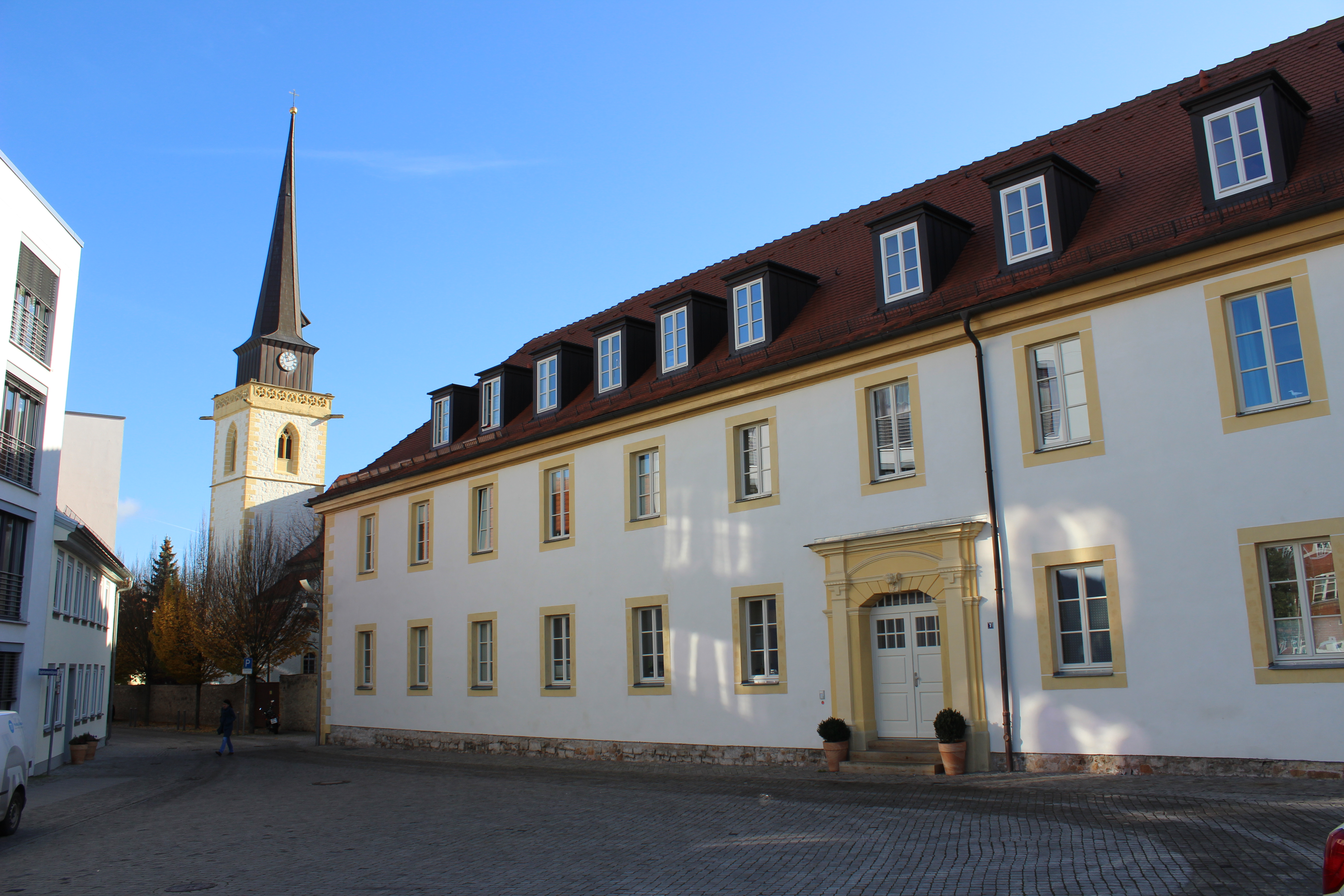 Martinskloster